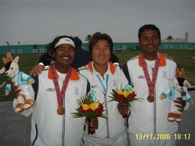 First get Asian games archery Bronze Team medal of India Archery team